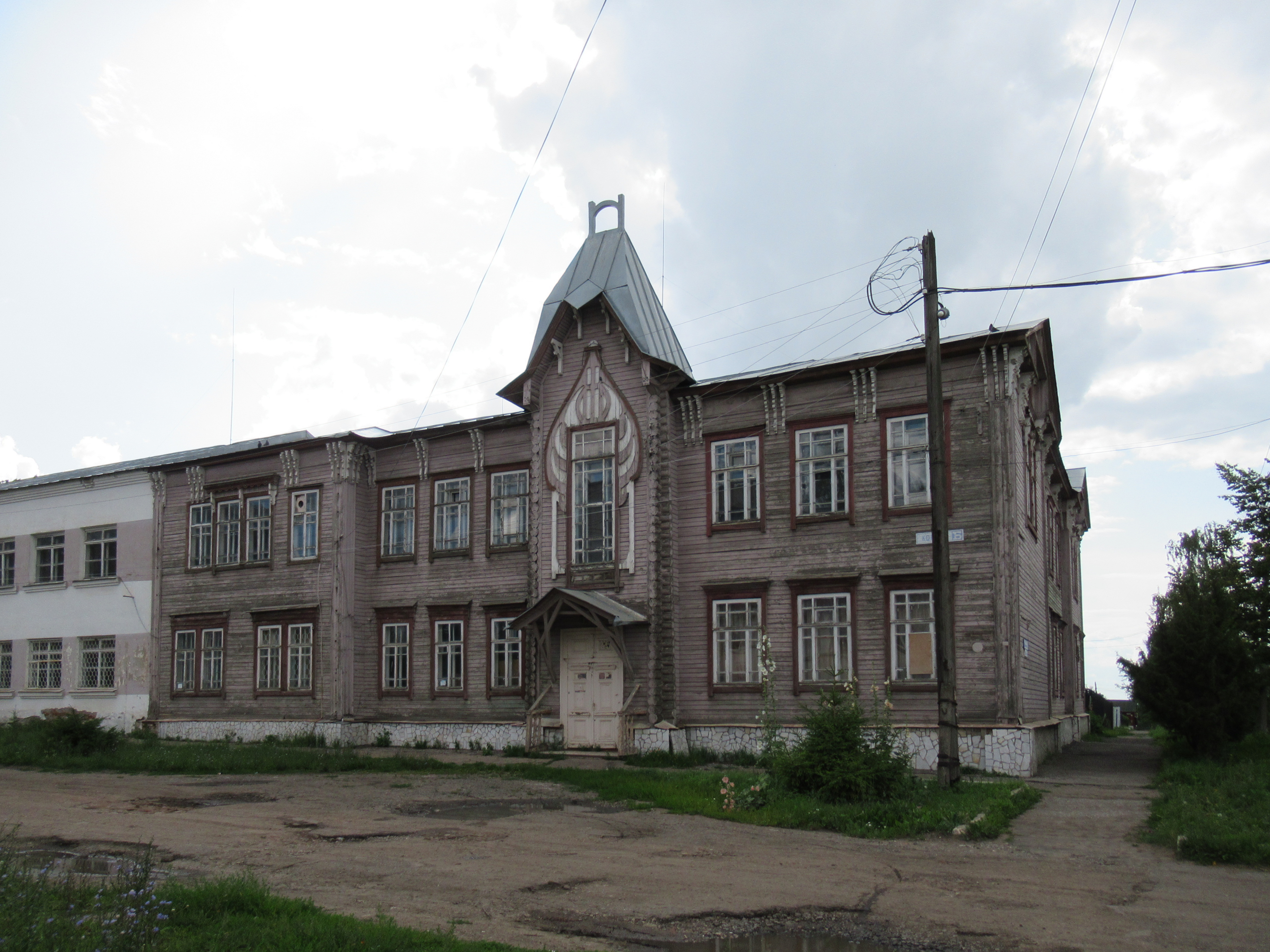 Здание городского училища: улица Комсомола, 47, Алатырь, Чувашия